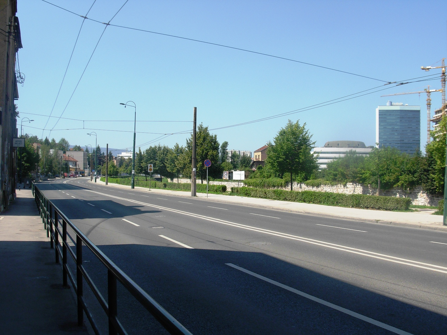 Ulica Terezije, Sarajevo, avgust 2011.